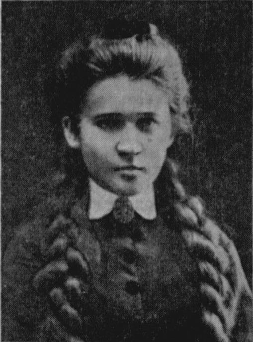 Субботина Мария Дмитриевна - русская революционерка, народница.